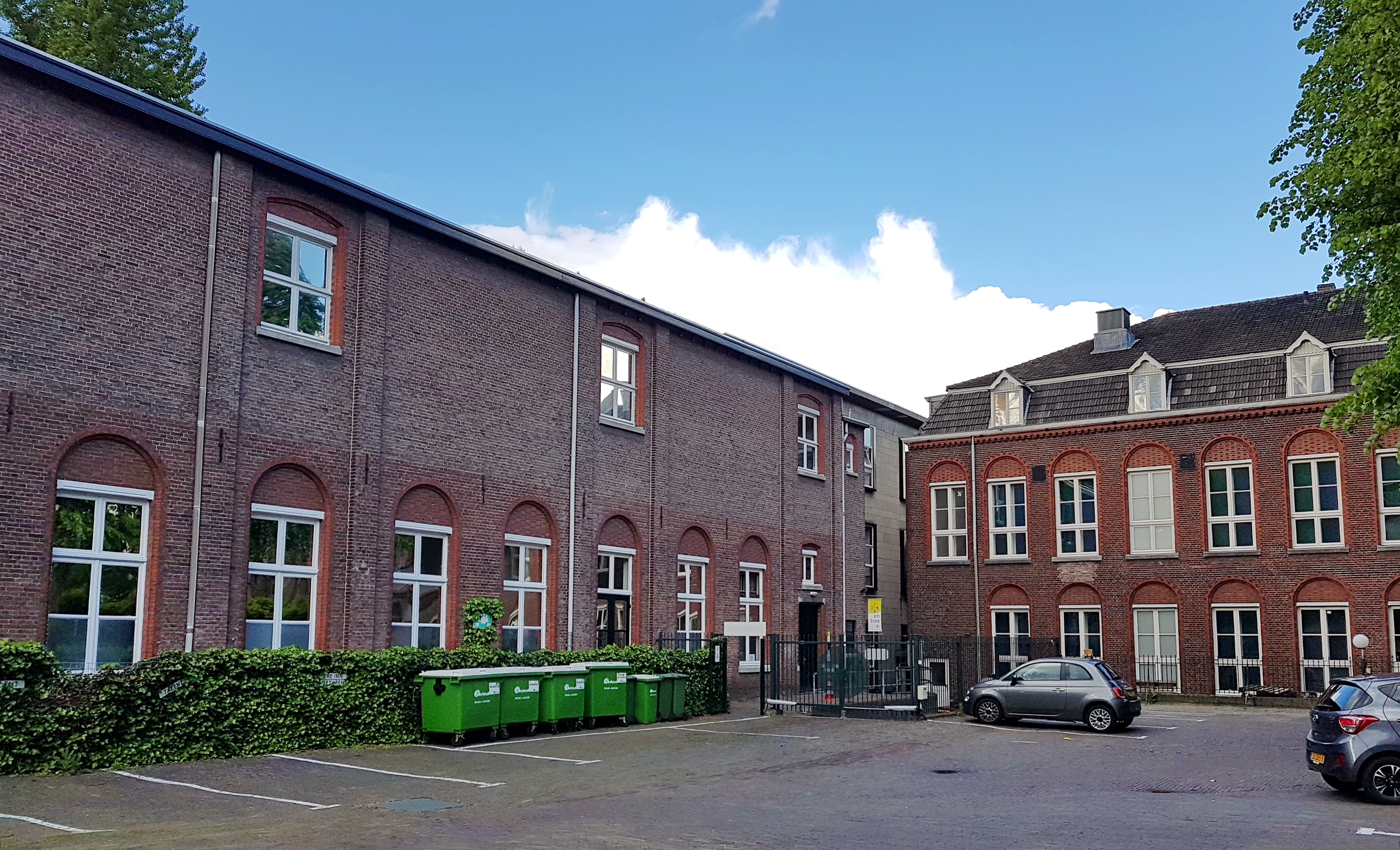 Achterzijde van de voormalige lagere meisjesschool van de ursulinen aan de Capucijnenstraat in Maastricht.